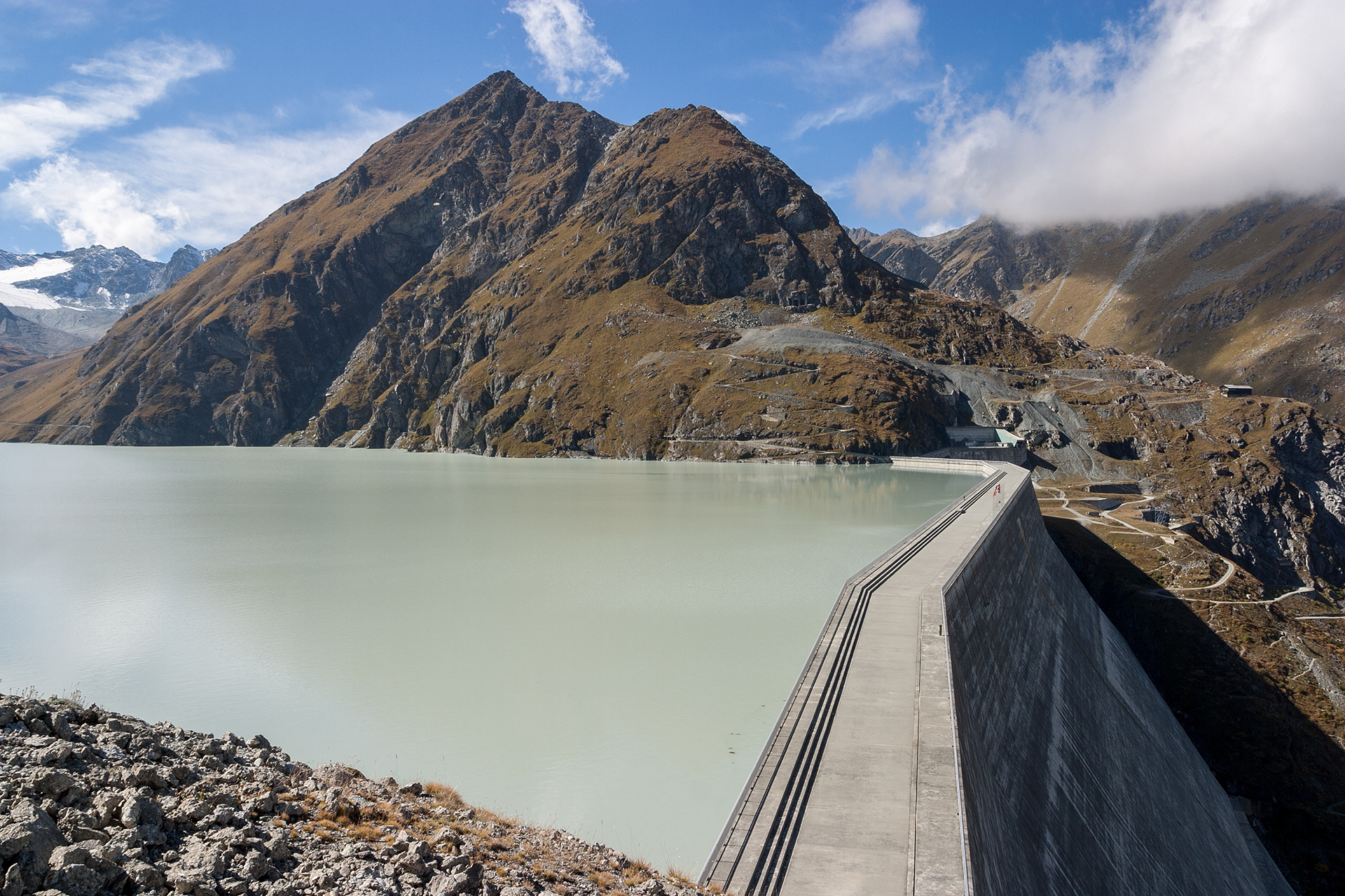 Stausee Grande-Dixence